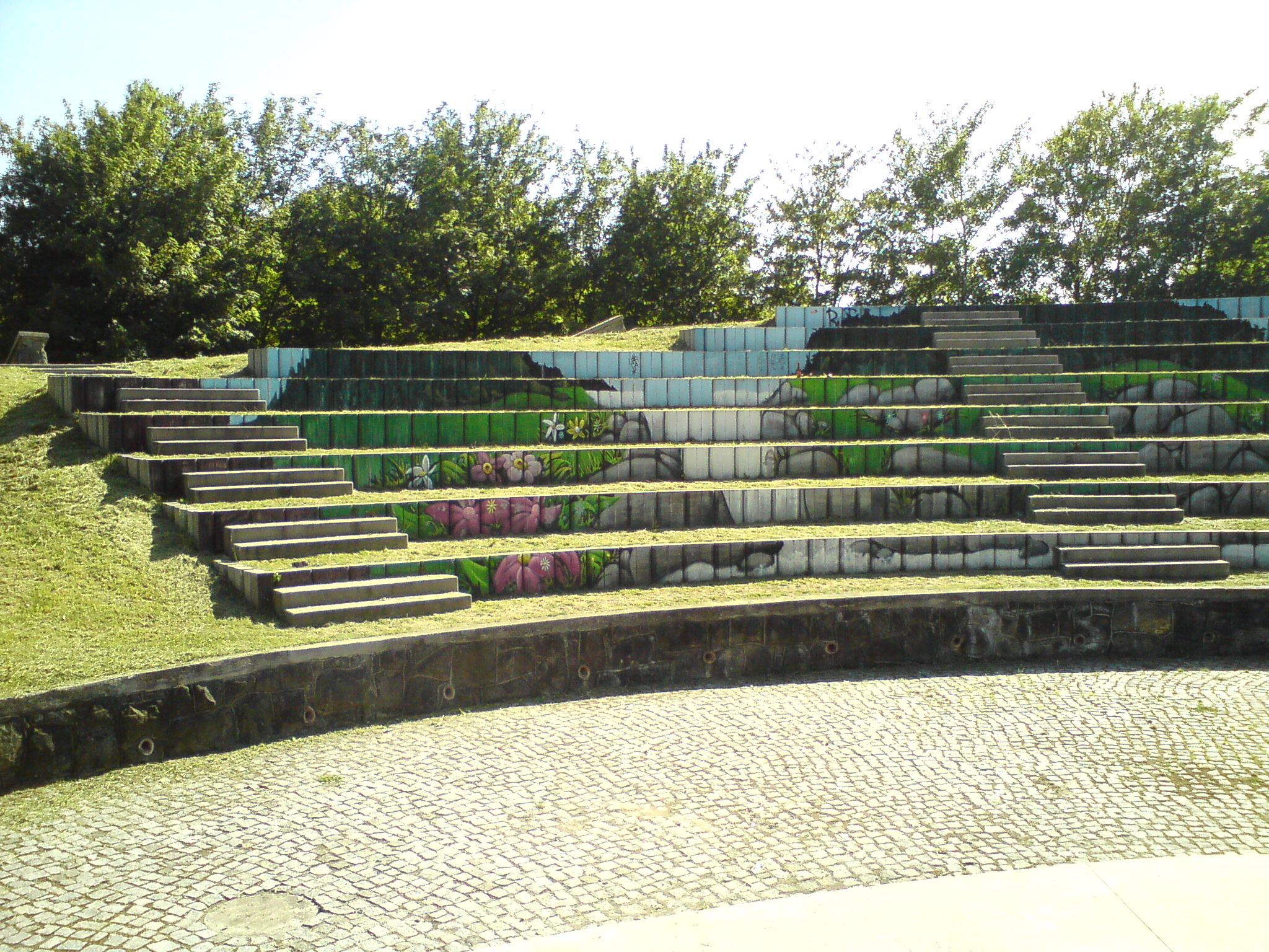 Amfiteatr w parku Baden-Powella w Łodzi (widok ze sceny)